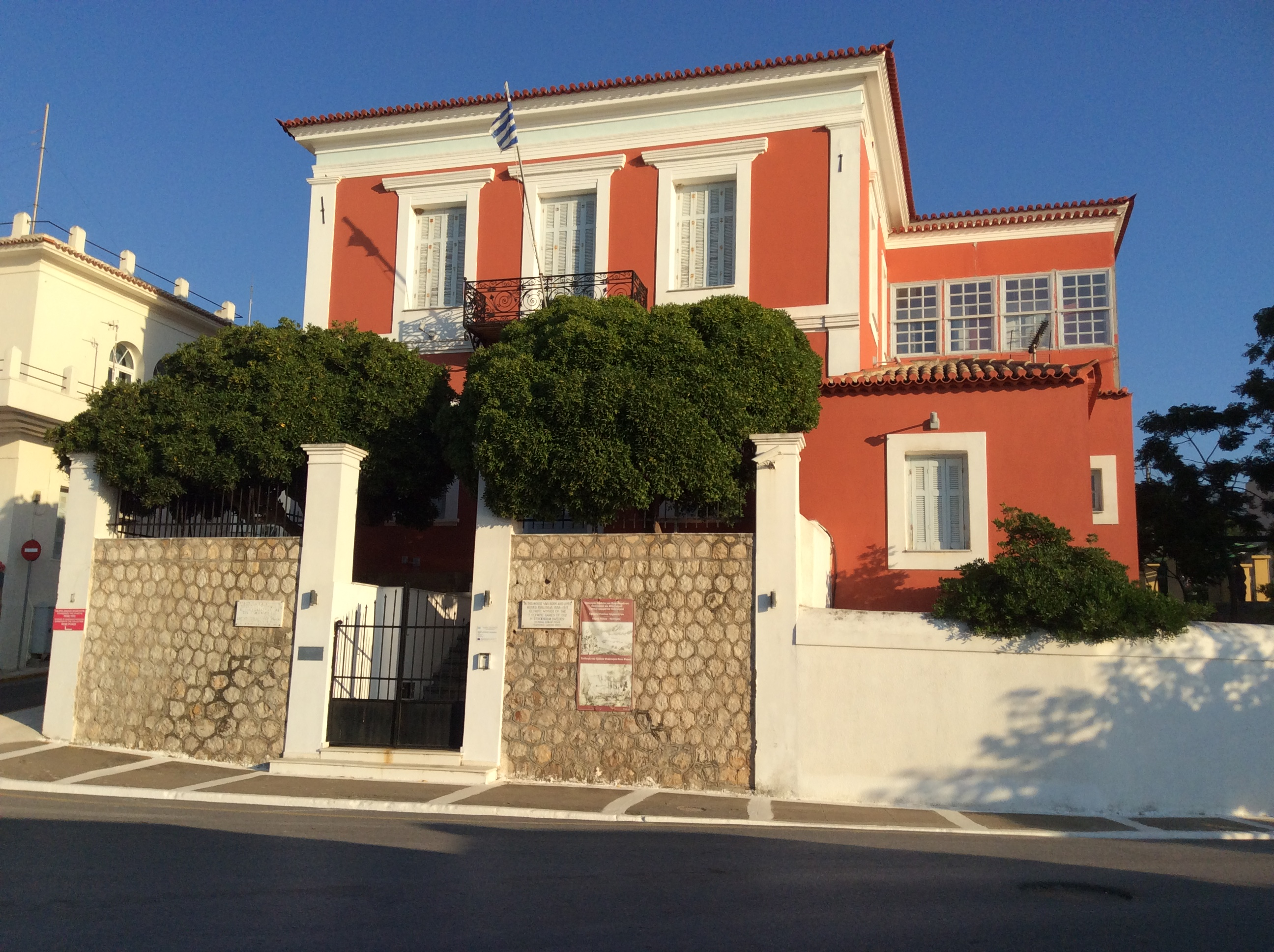 Πύλος - Το σπίτι του ολυμπιονίκη Κωνσταντίνου Τσικλητήρα.